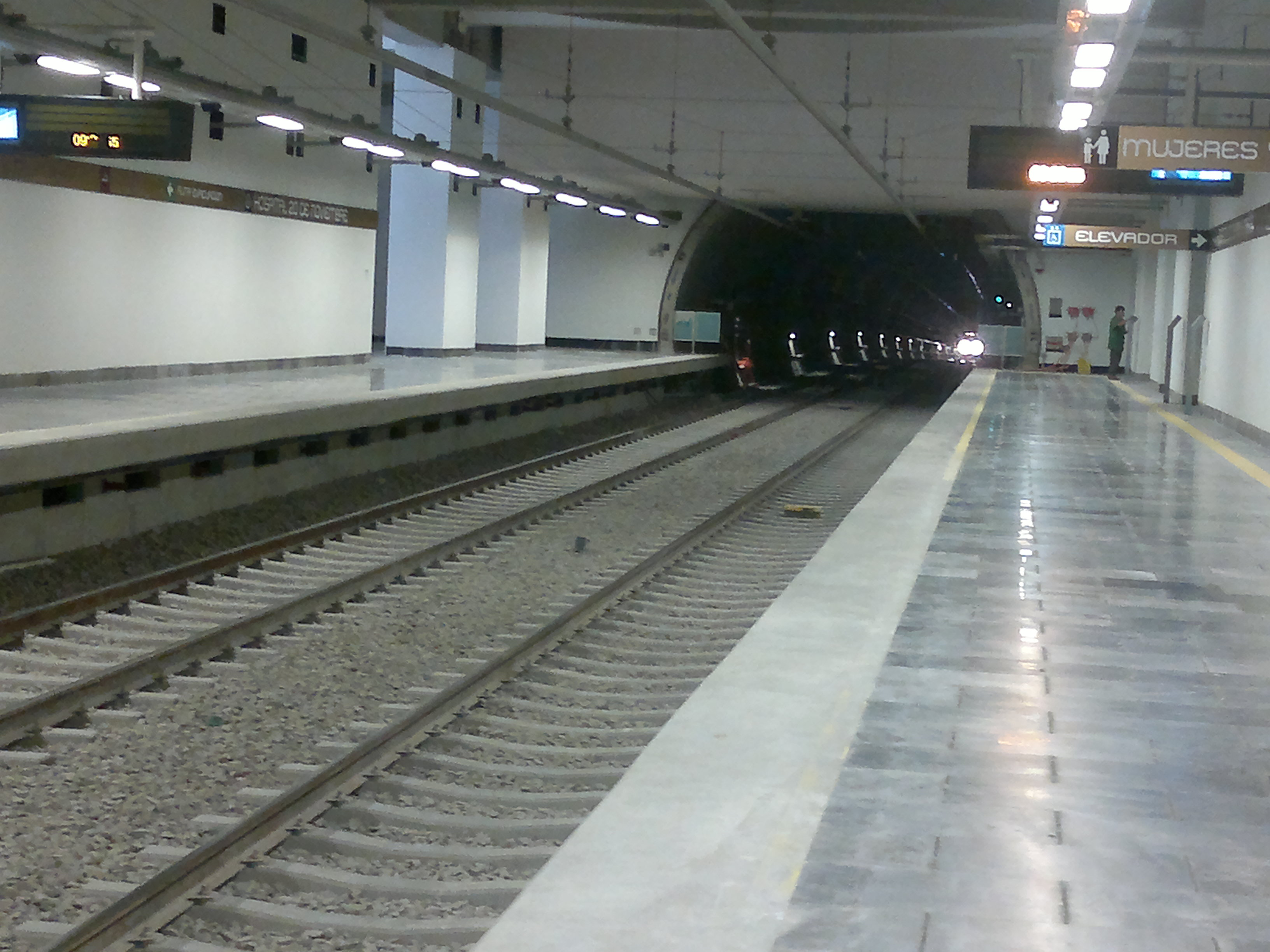 Interior de la estación Hospital 20 de Noviembre, Línea 12 del Metro de la Ciudad de México, andén dirección Tláhuac